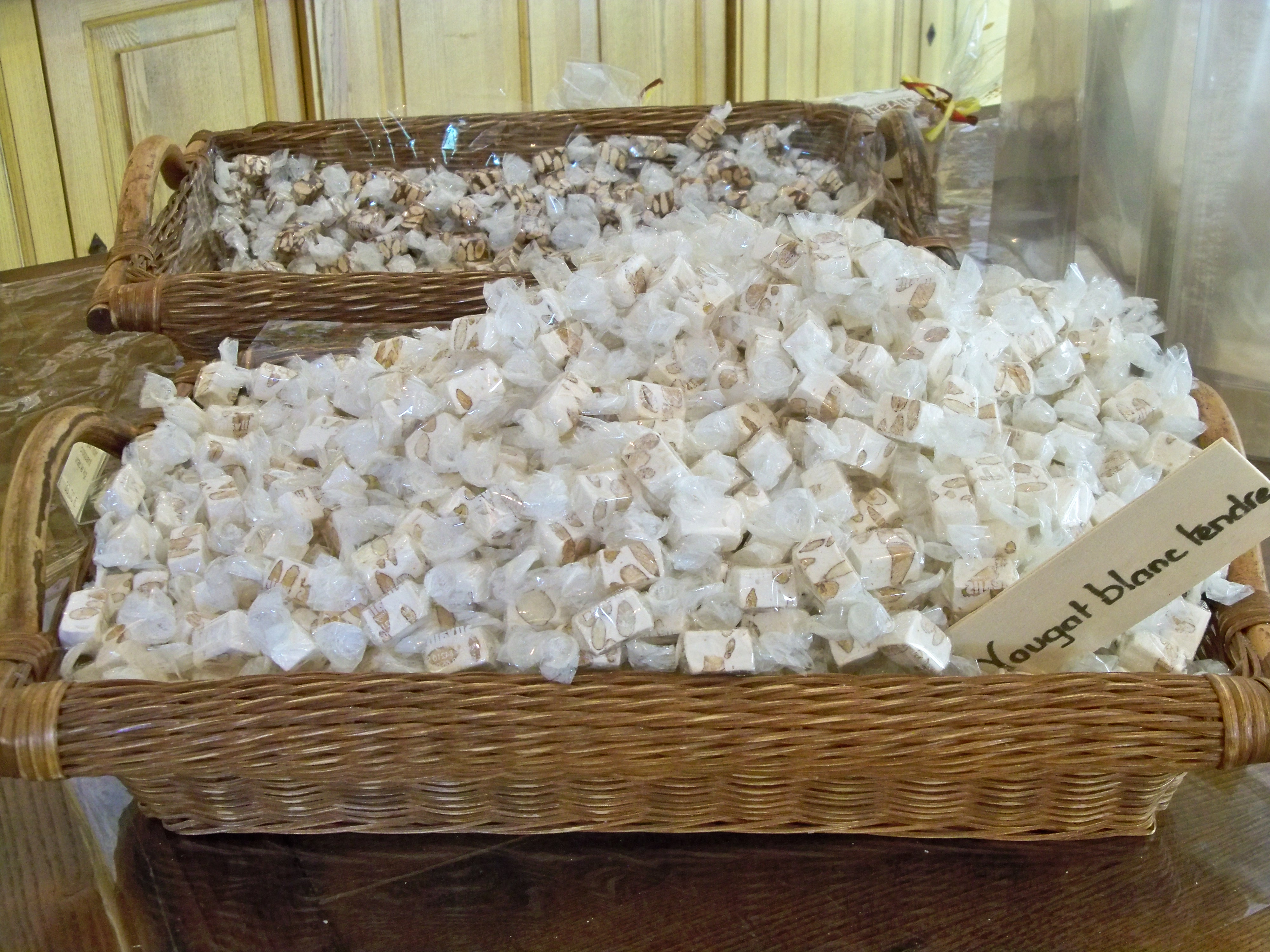 Nougat blanc de Saint Didier, Vaucluse, France